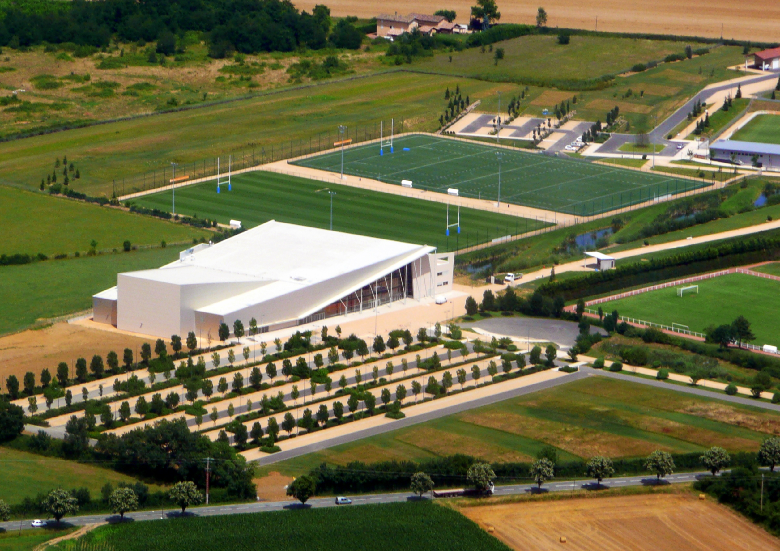 Vue aérienne du palais omnisports